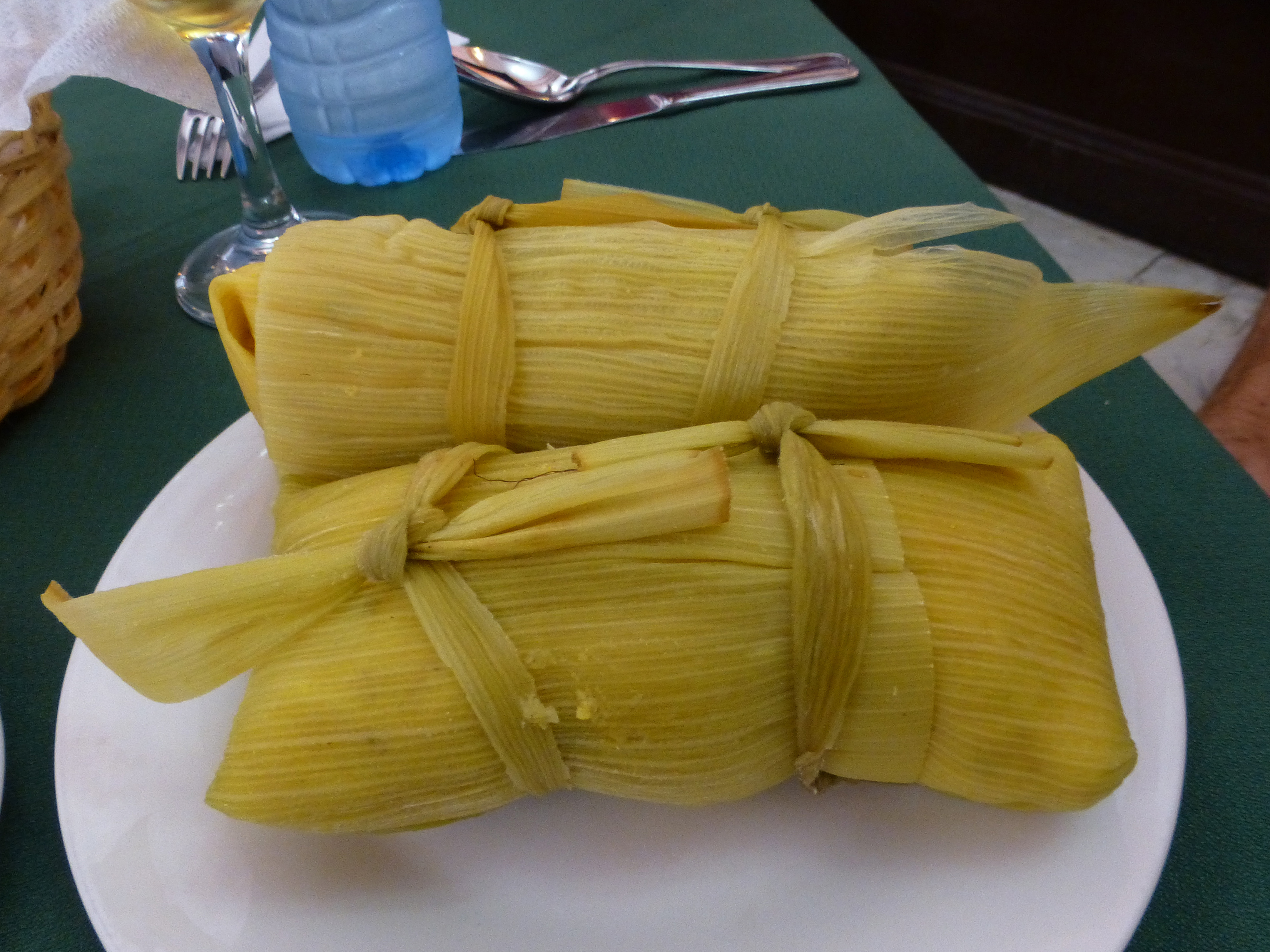 Cuba : tamales pliés